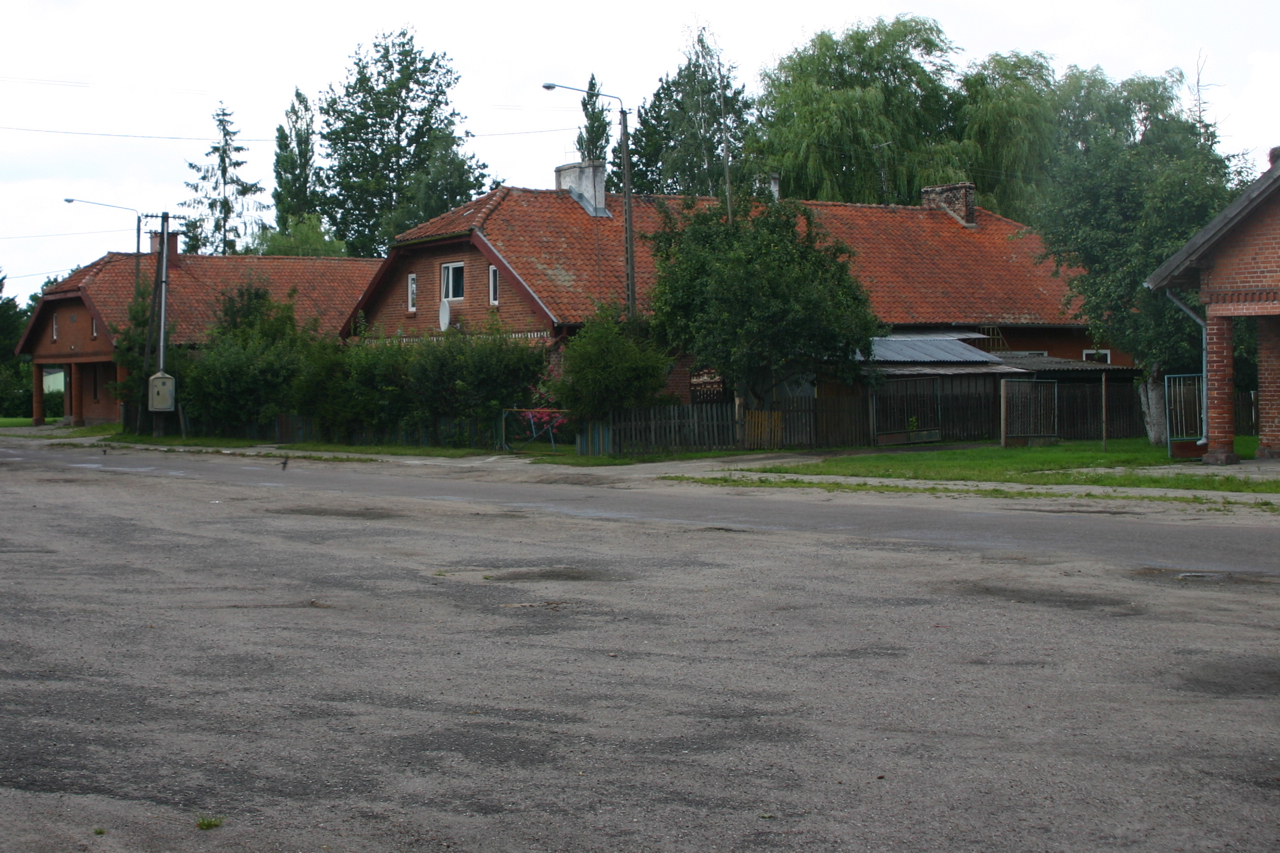 Sątoczno (niem. Leunenburg) – wieś w Polsce położona w województwie warmińsko-mazurskim, w powiecie kętrzyńskim, w gminie Korsze.